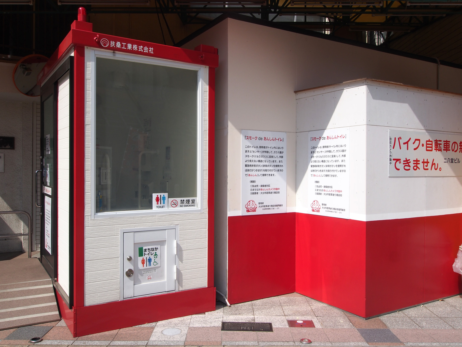 若草通り公衆トイレ（大分県大分市）